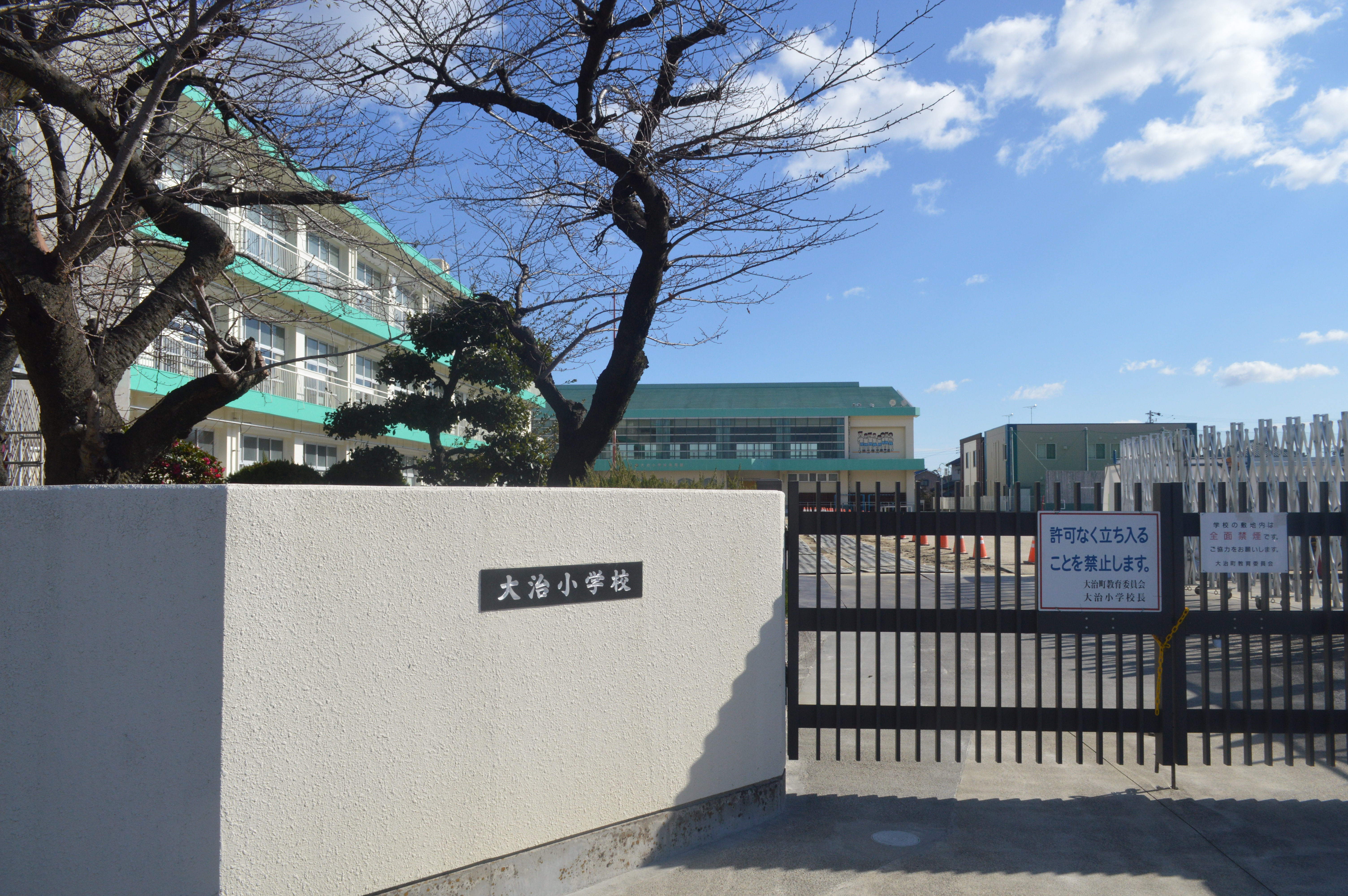 愛知県海部郡大治町にある大治町立大治小学校。